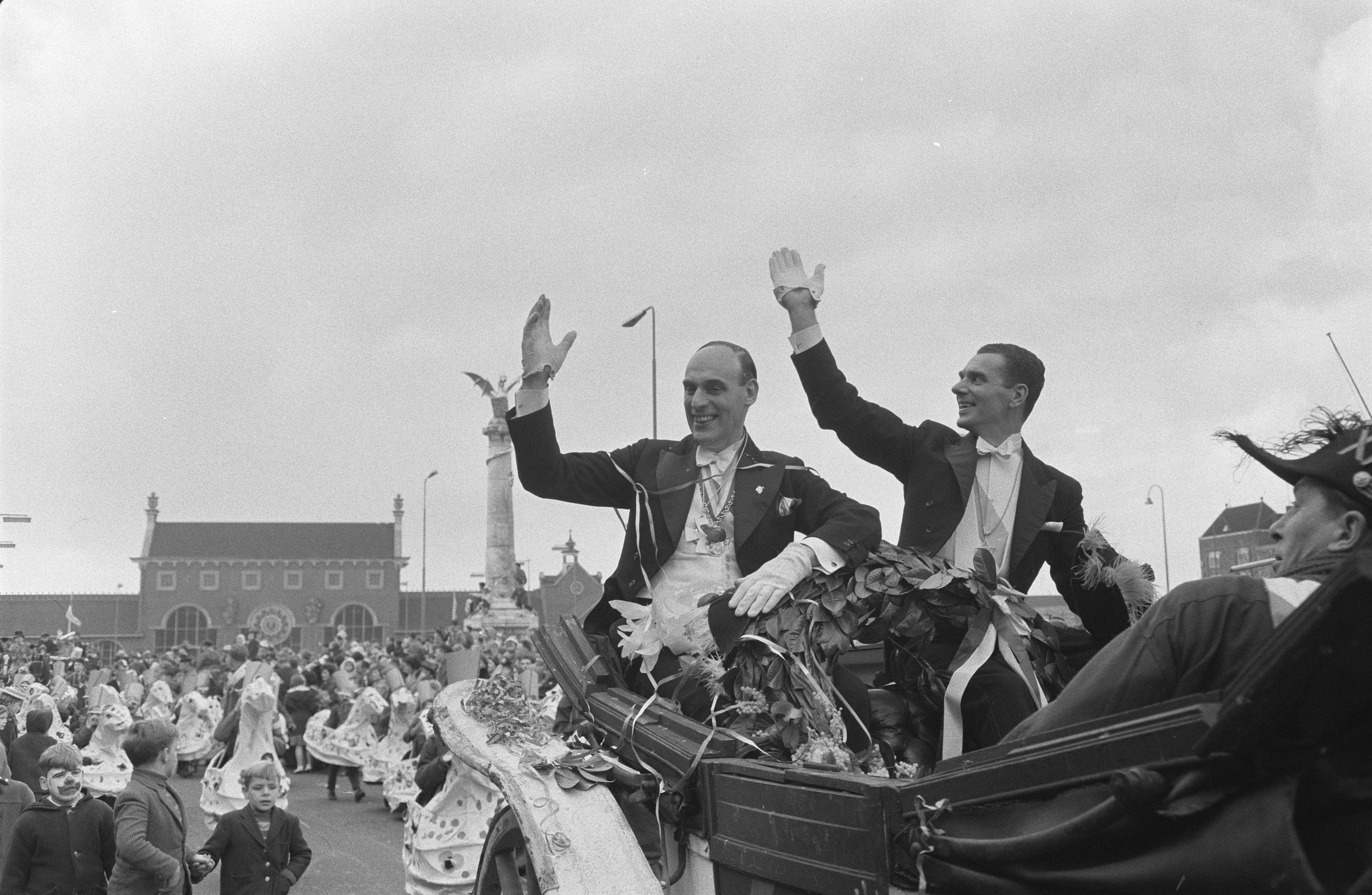 Collectie / Archief : Fotocollectie Anefo Reportage / Serie : [ onbekend ] Beschrijving : Carnavalsviering in Den Bosch , Prins Carnaval tijdens zijn intocht Datum : 12 februari 1961 Locatie : Den Bosch Trefwoorden : Carnavalsviering, Intochten Fotograaf : Pot, Harry / Anefo Auteursrechthebbende : Nationaal Archief Materiaalsoort : Negatief (zwart/wit) Nummer archiefinventaris : bekijk toegang 2.24.01.05 Bestanddeelnummer : 912-0873